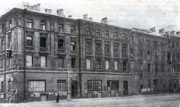 Дом Лопатина в 1941-1943 годах